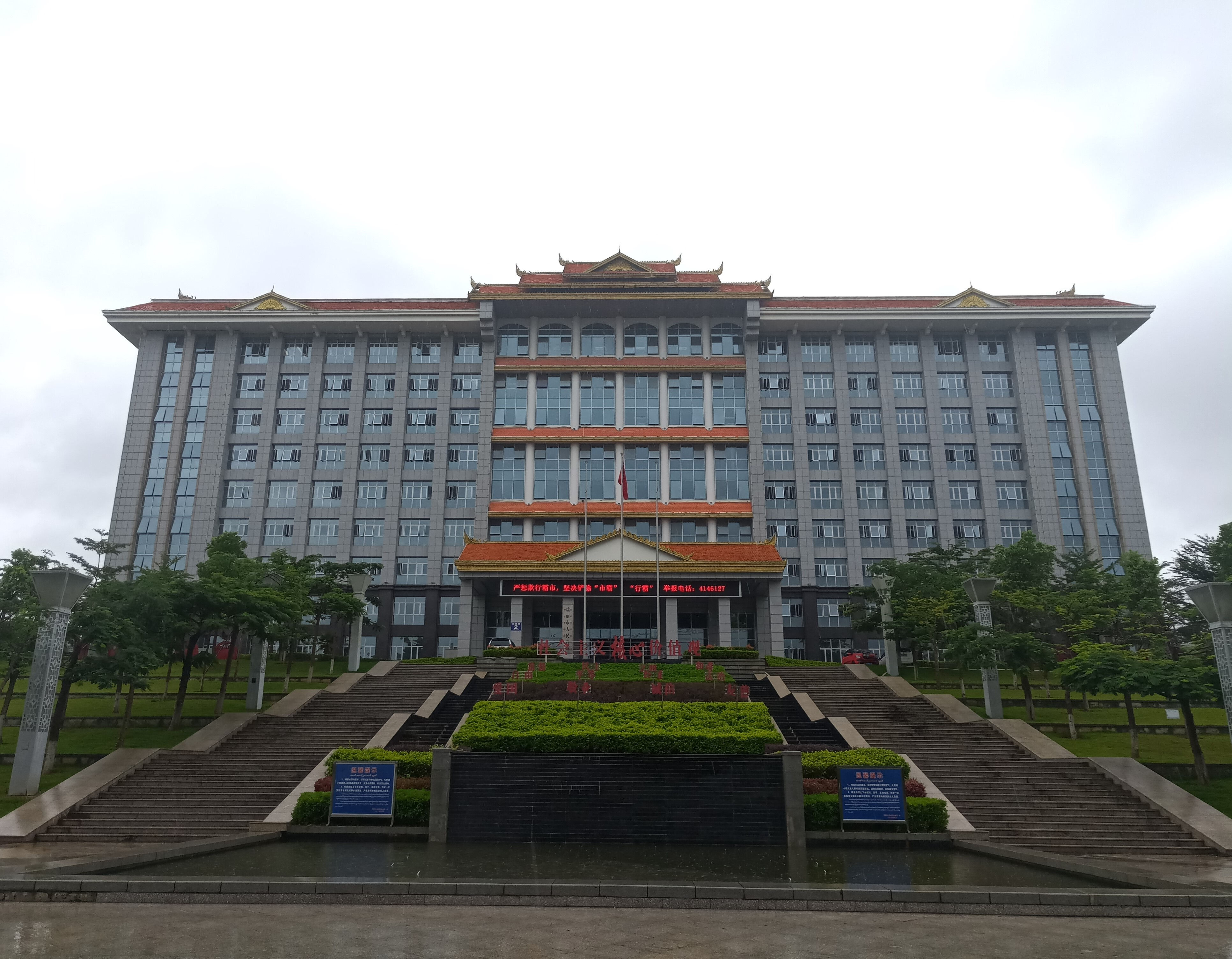 中文（中国大陆）: 瑞丽市人民政府